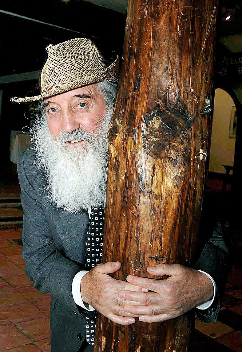 José María Moro es un escultor nacido en Madrid y afincado en Segovia